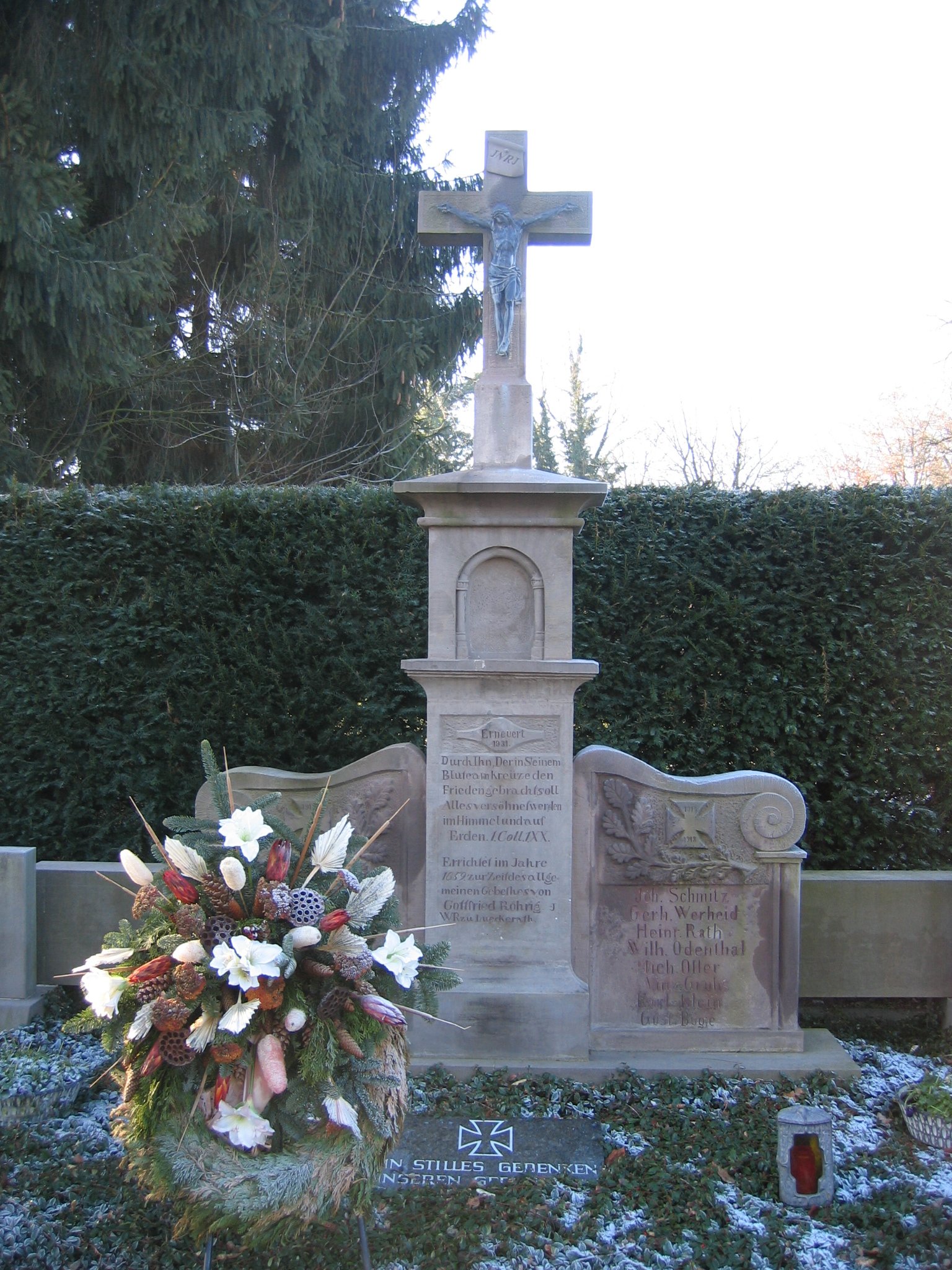 Kriegsdenkmal in Lückerath (Bergisch Gladbach)